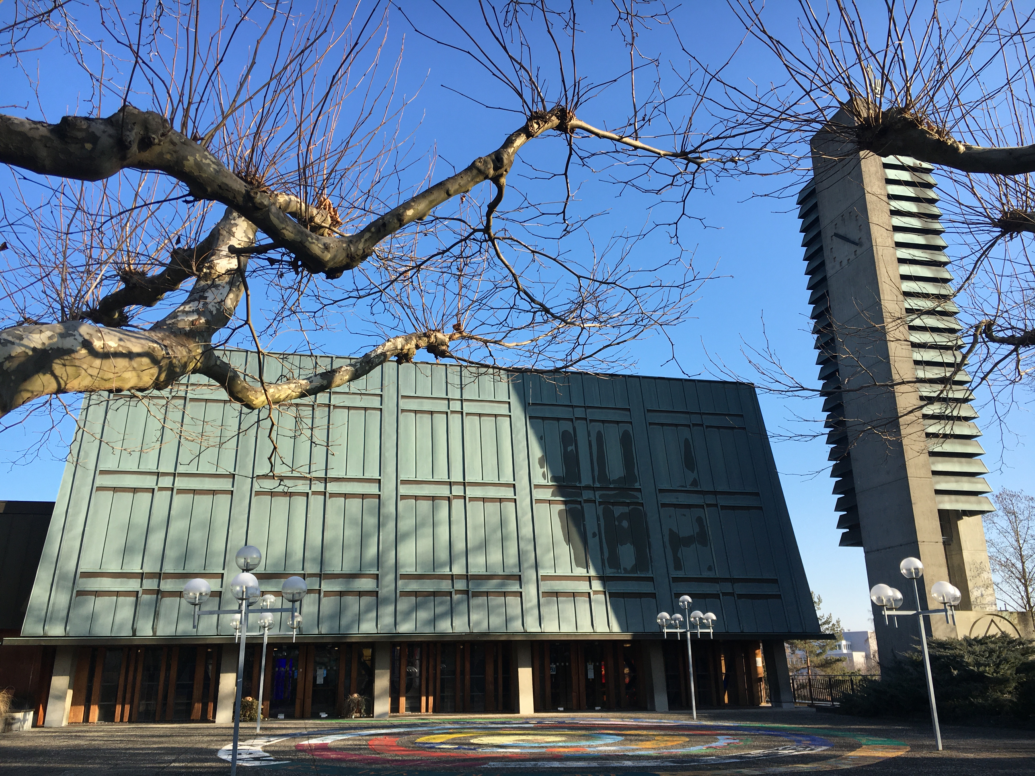 Tomaskirch vom Kirchenplatz her